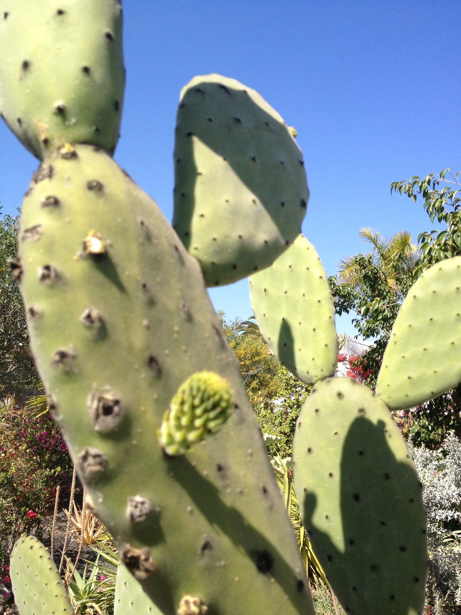 opuntia tomentosa